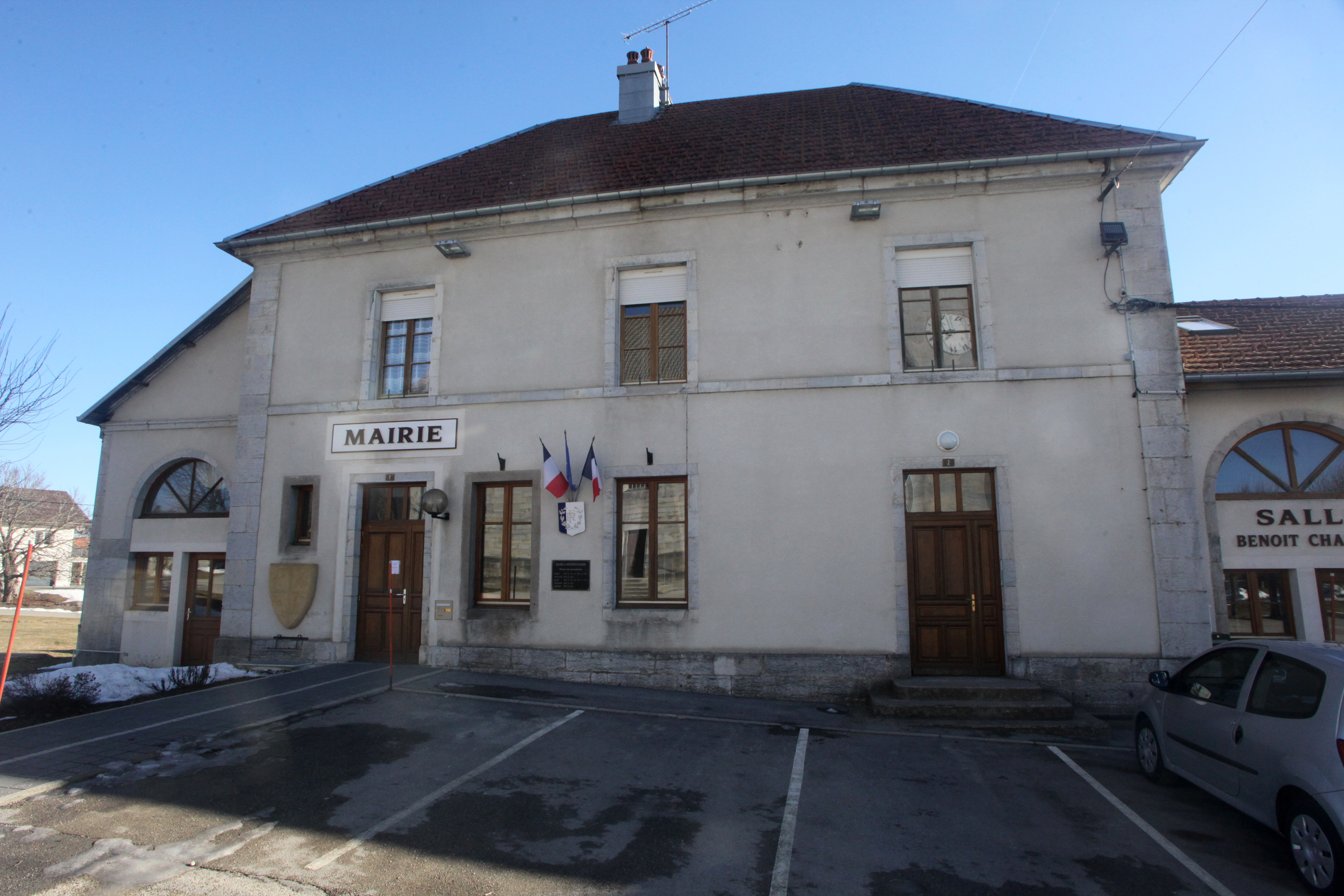 Mairie de Fournet-Luisans.